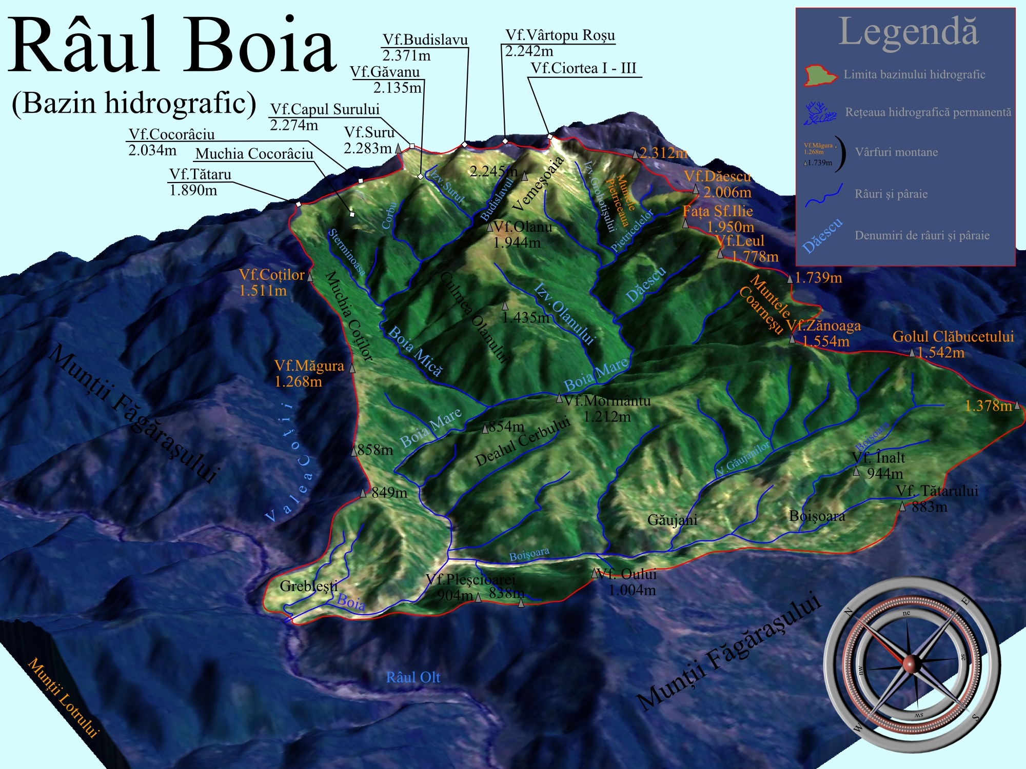 Harta 3D pentru Bazinul hidrografic al Râului Boia, afluent al Oltului. Selectați alte bazine hidrografice adiacente ale Defileului Oltului, menționate pe hartă în mod senzitiv cu chenare de note informative.